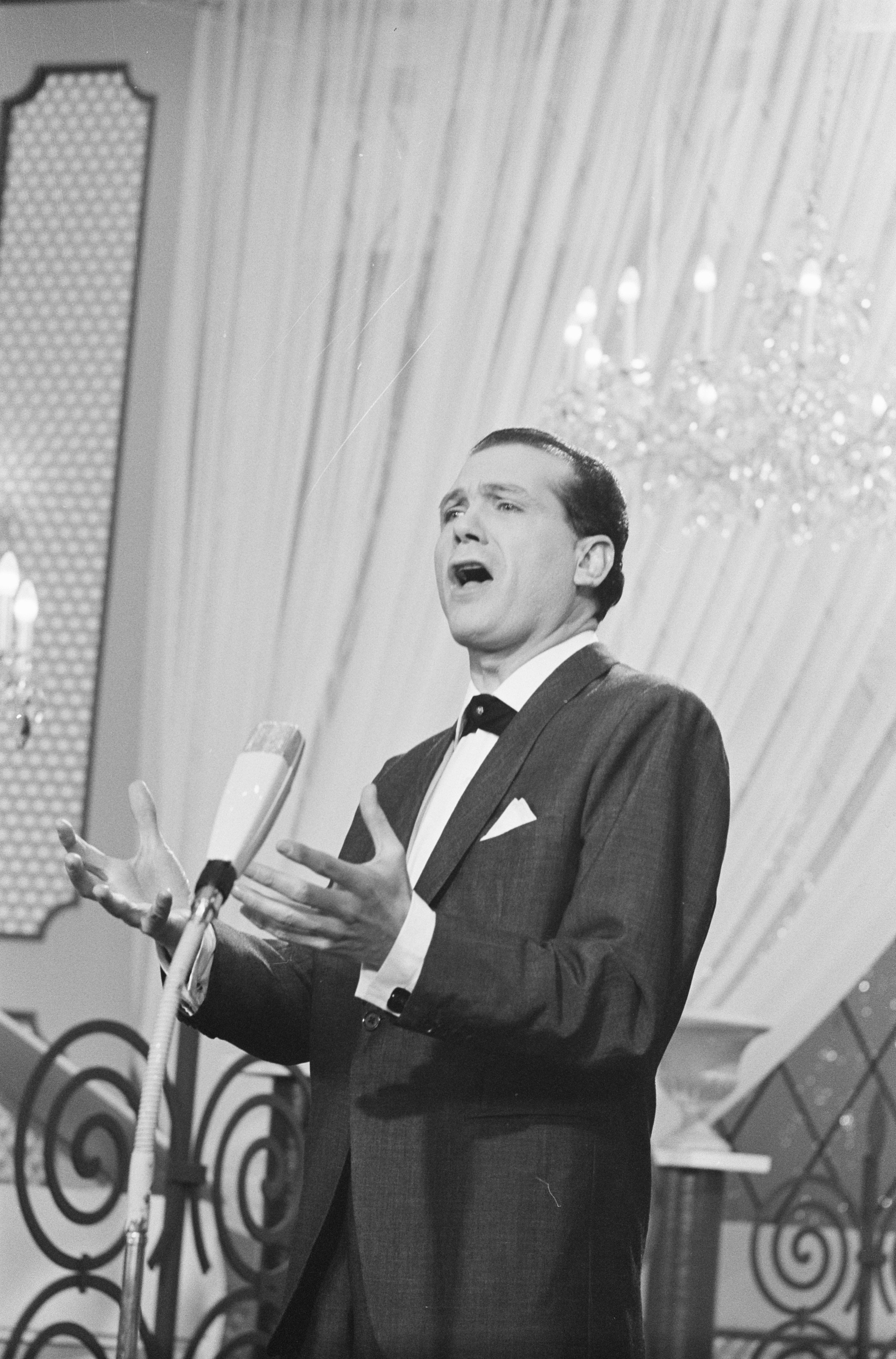 Collectie / Archief : Fotocollectie Anefo Reportage / Serie : [ onbekend ] Beschrijving : Eurovisie Songfestival 1962 te Luxemburg, voor Spanje Victor Balaguer Datum : 18 maart 1962 Locatie : Luxemburg, Spanje Trefwoorden : artiesten, songfestivals Persoonsnaam : Balaguer Victor Fotograaf : Pot, Harry / Anefo Auteursrechthebbende : Nationaal Archief Materiaalsoort : Negatief (zwart/wit) Nummer archiefinventaris : bekijk toegang 2.24.01.05 Bestanddeelnummer : 913-6598